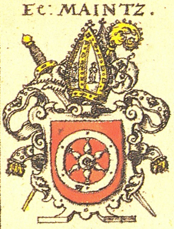 Johann Siebmacher: New Wappenbuch Erz- und andere Bistümer Auszug aus Blatt 9 eingescannt aus: Horst Appuhn (Hrsg.), Johann Siebmachers Wappenbuch. Die bibliophilen Taschenbücher 538, 2. verb. Aufl , Dortmund 1989